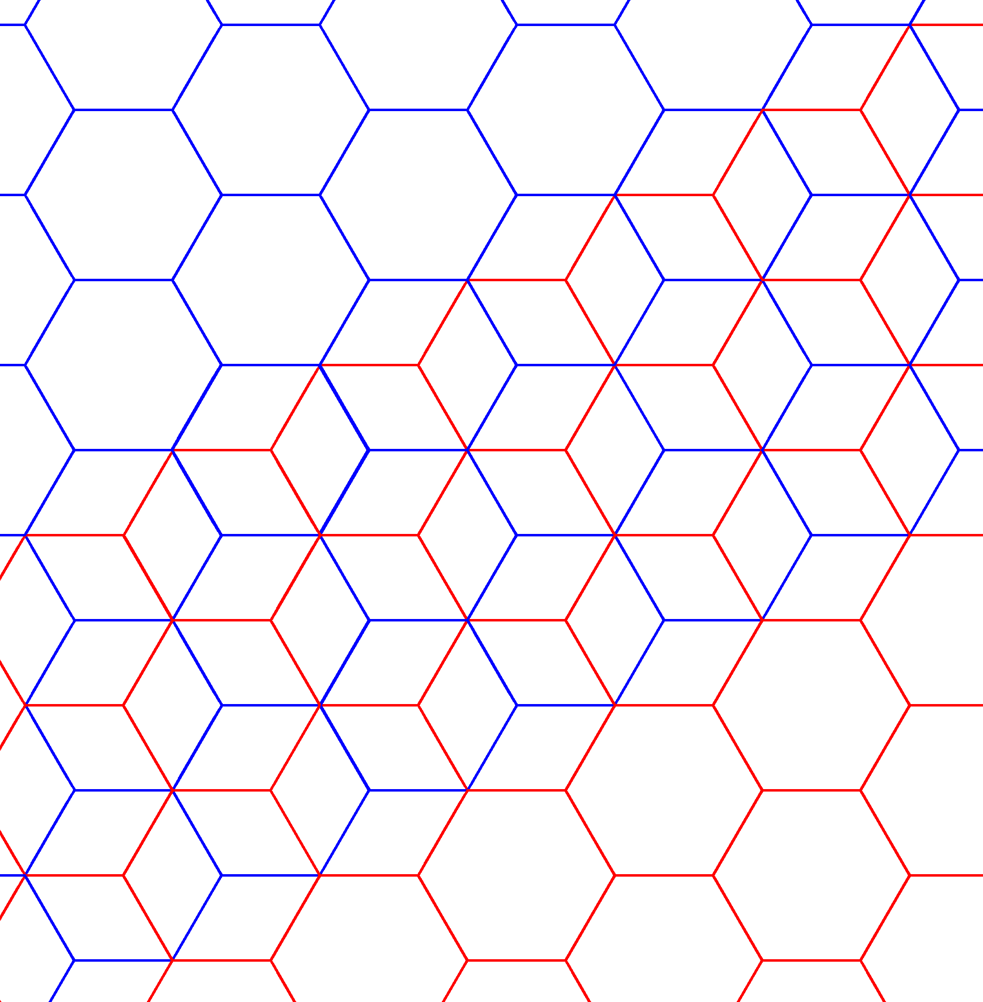 二複合正六邊形鑲嵌